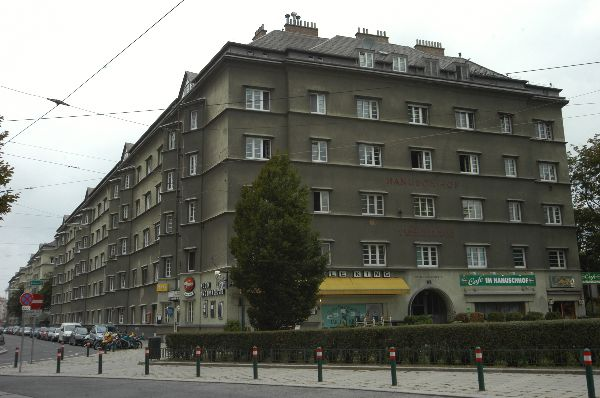 Der Hanuschhof - ein Wiener Gemeindebau der Zwischenkriegszeit